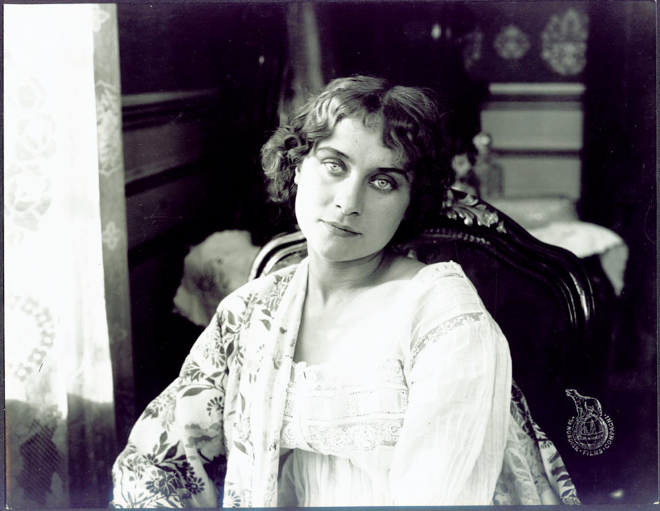 Bertha Nina Sommerfelt i stumfilmen "Pengenes Magt", 1917